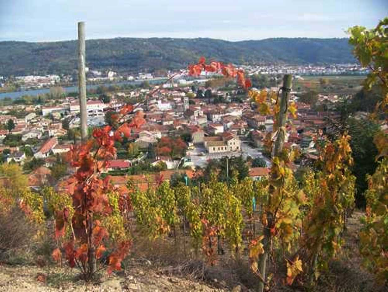 Sarras vue partielle